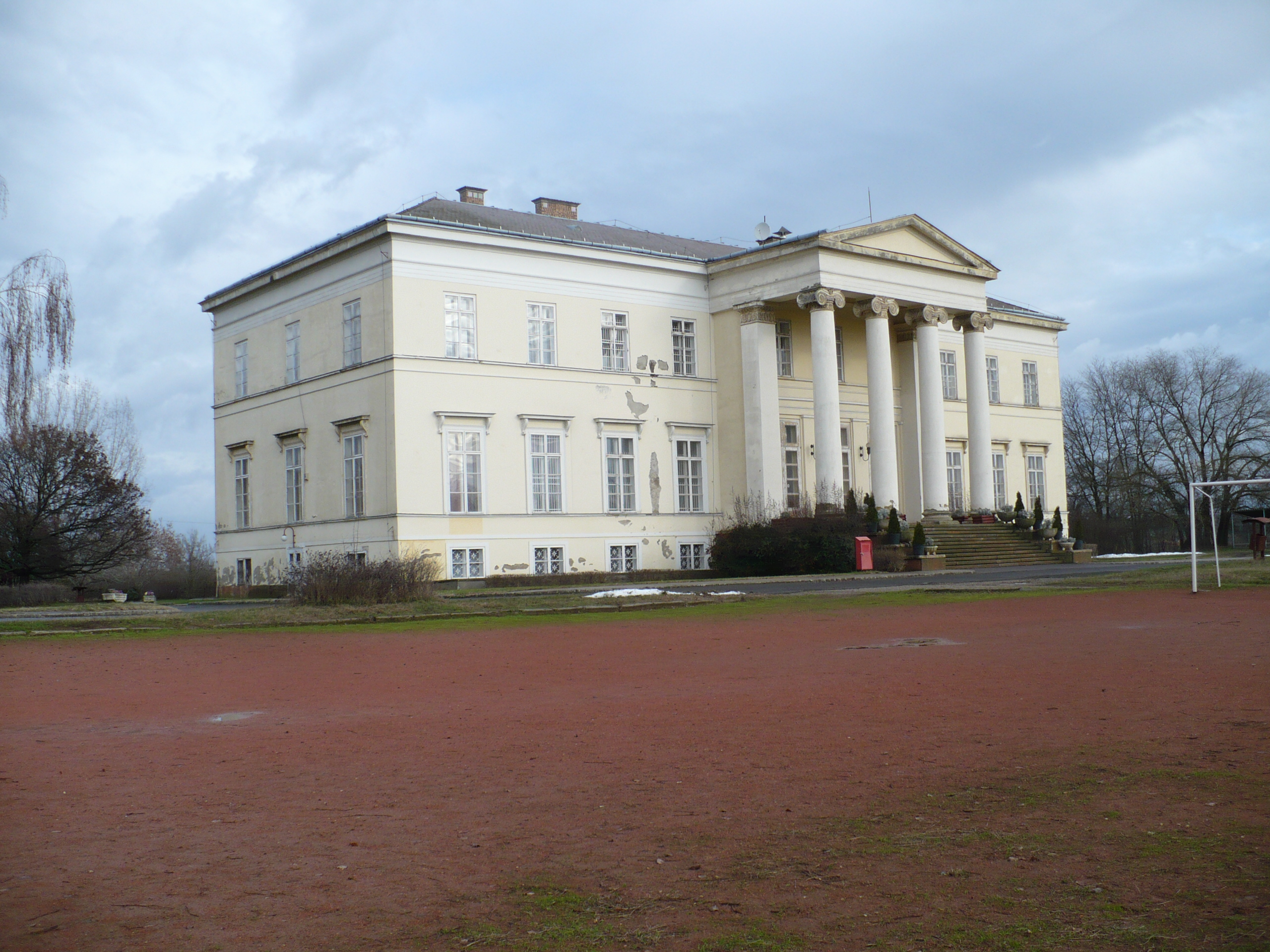 A gyömrői Teleki-kastély 2009-ben